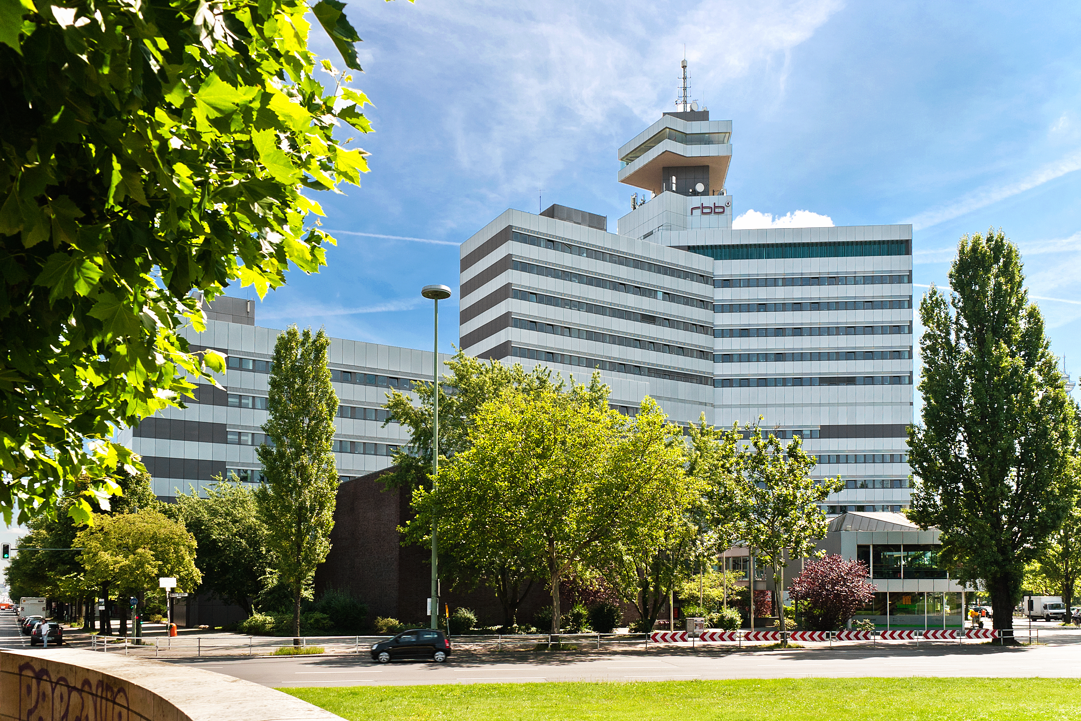 Gebäude des RBB, Theodor-Heuss-Platz